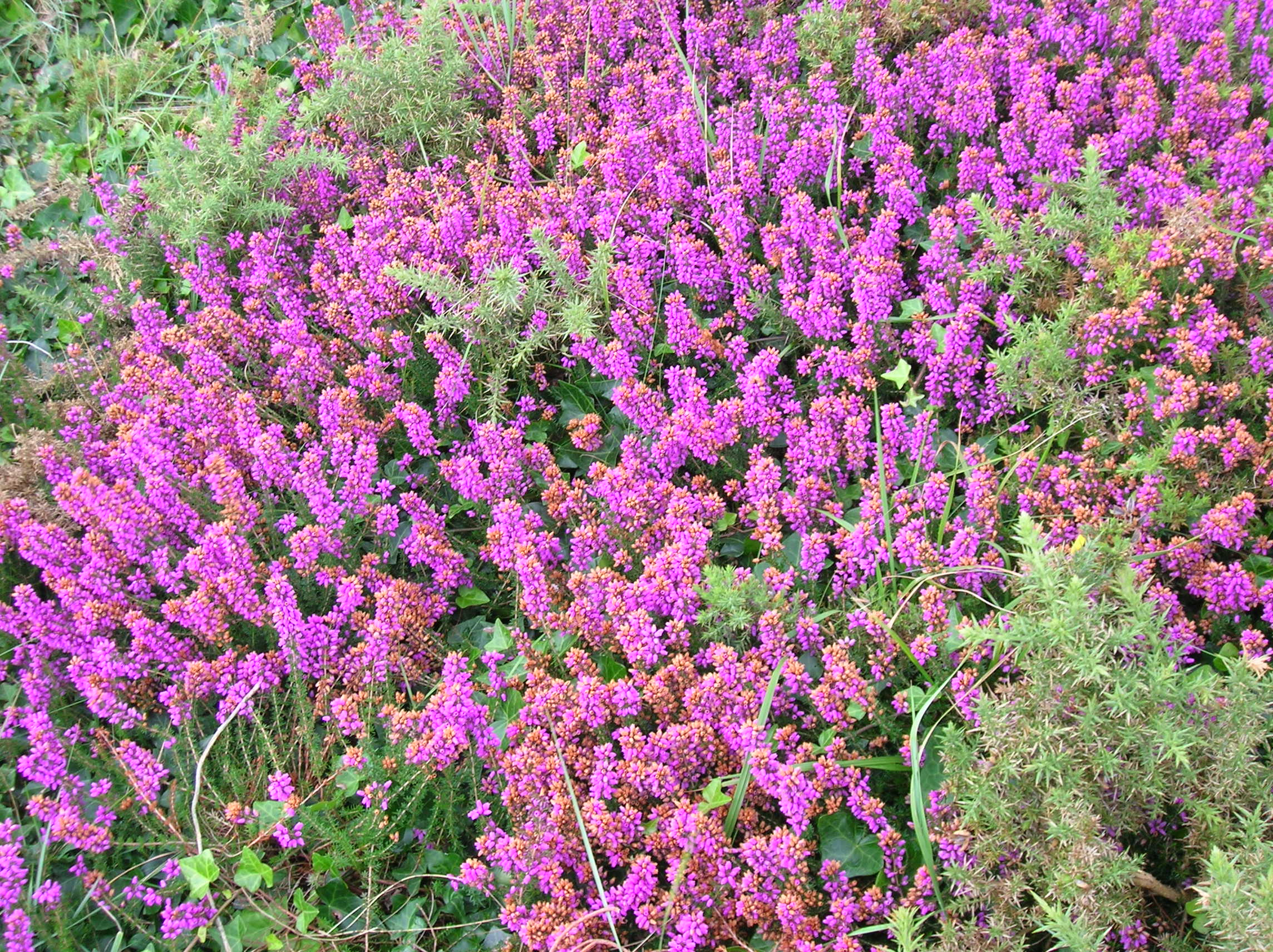 Erica cinerea : Bruyère des landes